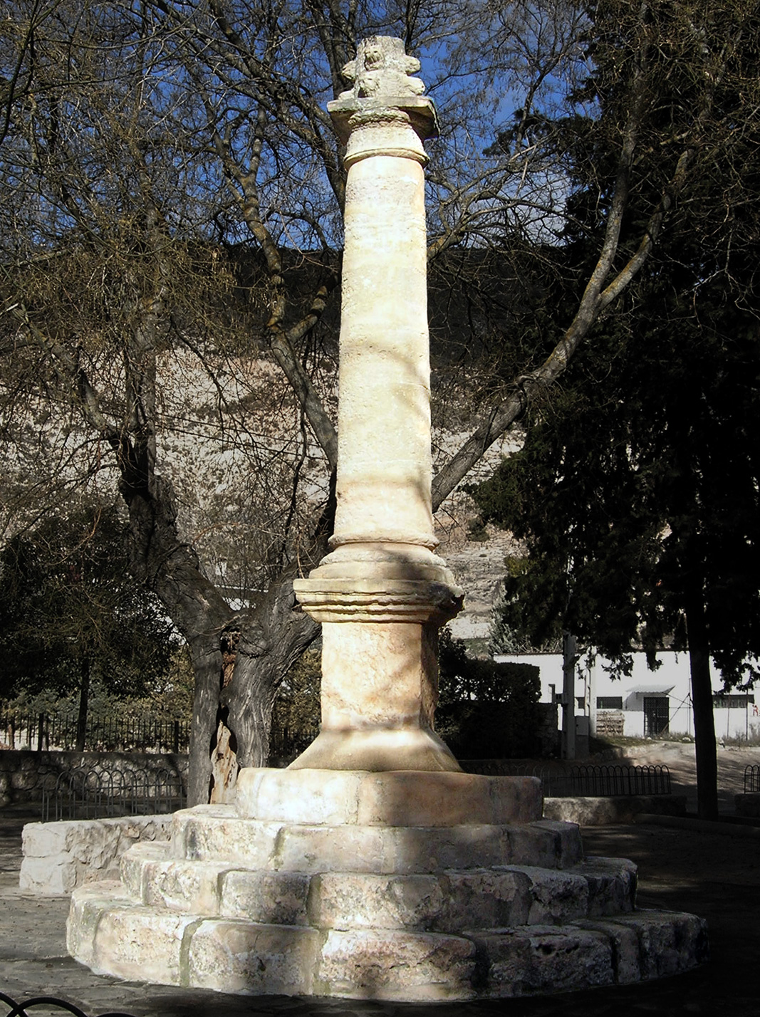 La Picota